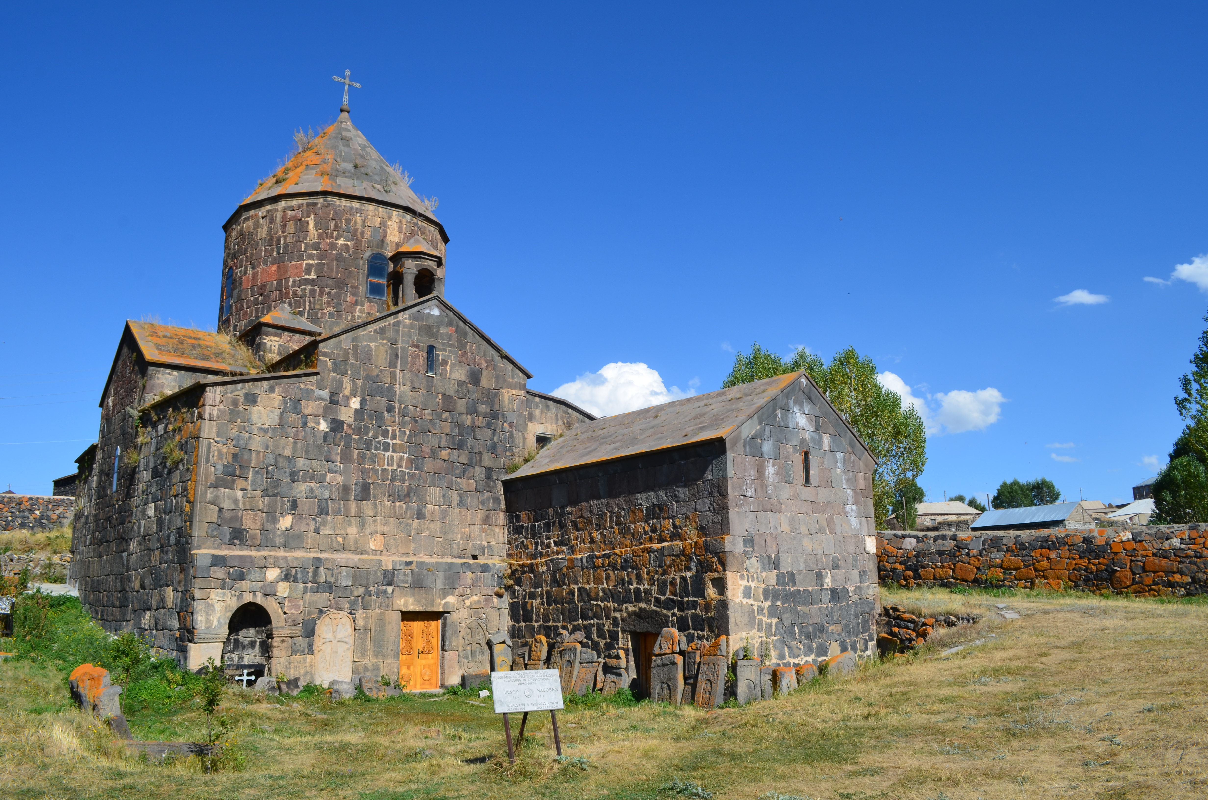 Վանական համալիր, Մաքենյաց վանք 64/9